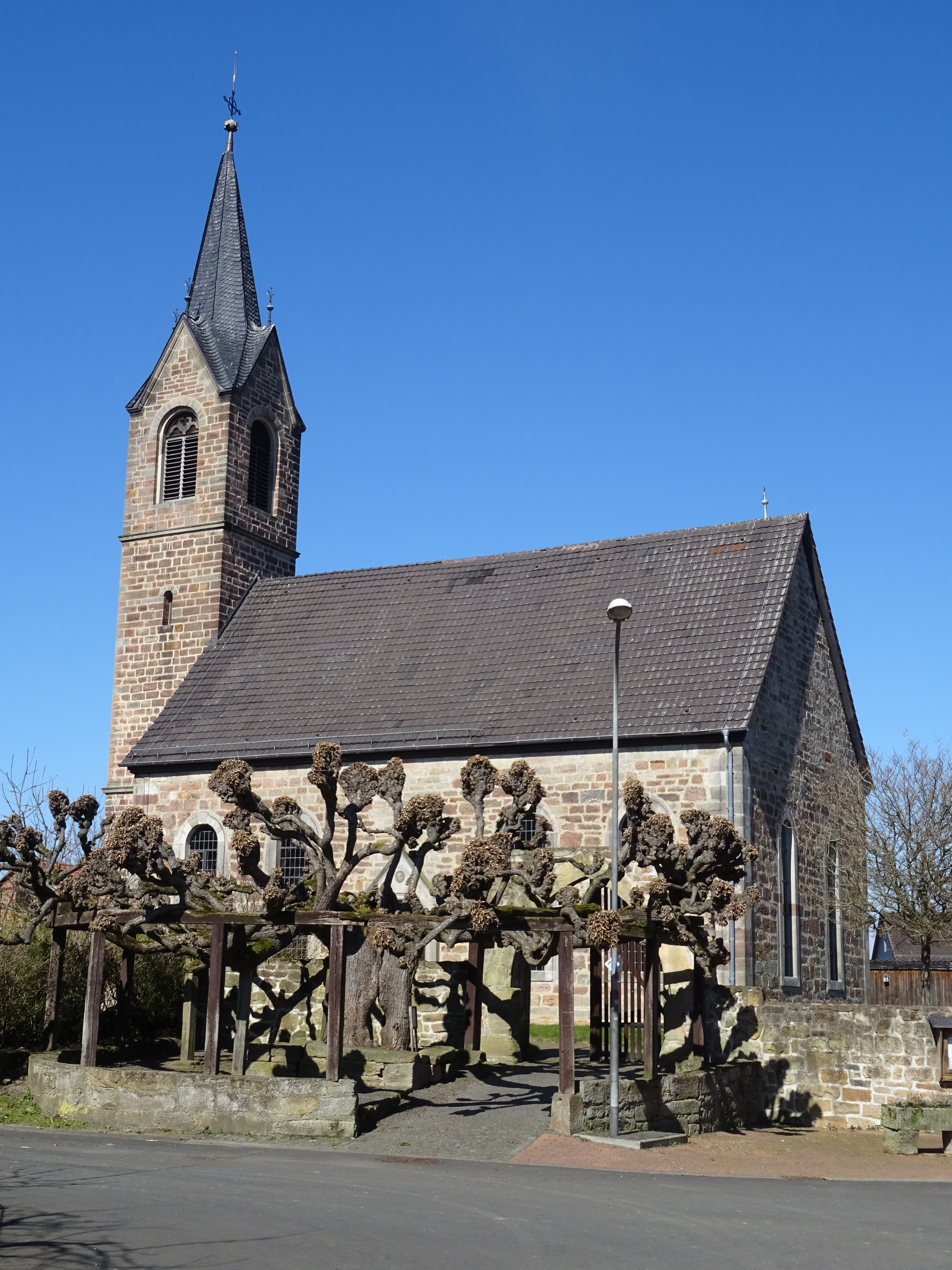 Südseite